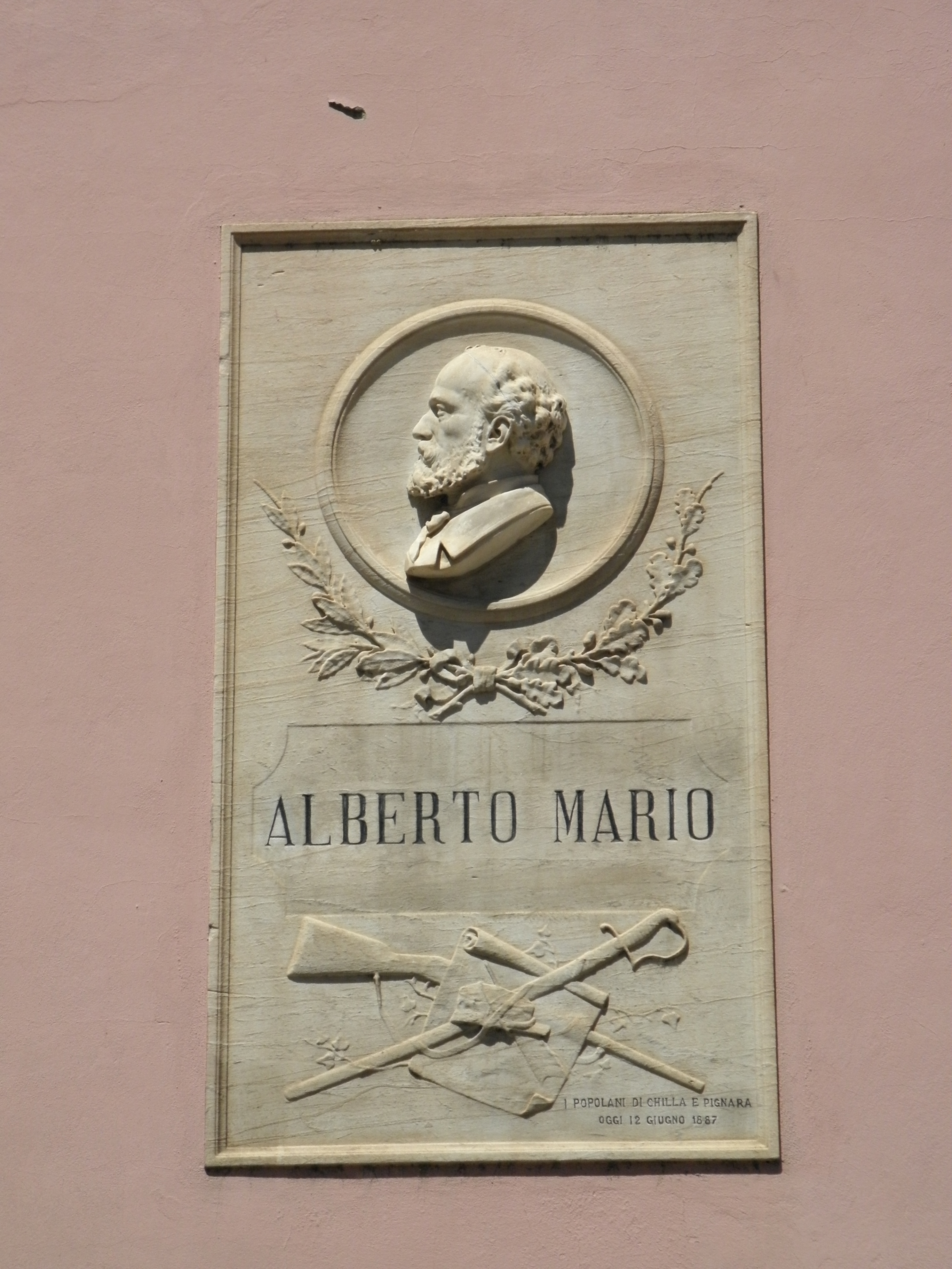 Adria, la lapide commemorativa dedicata ad Alberto Mario datata 1887 murata su una palazzina situata alla sinistra del Palazzo Vescovile..